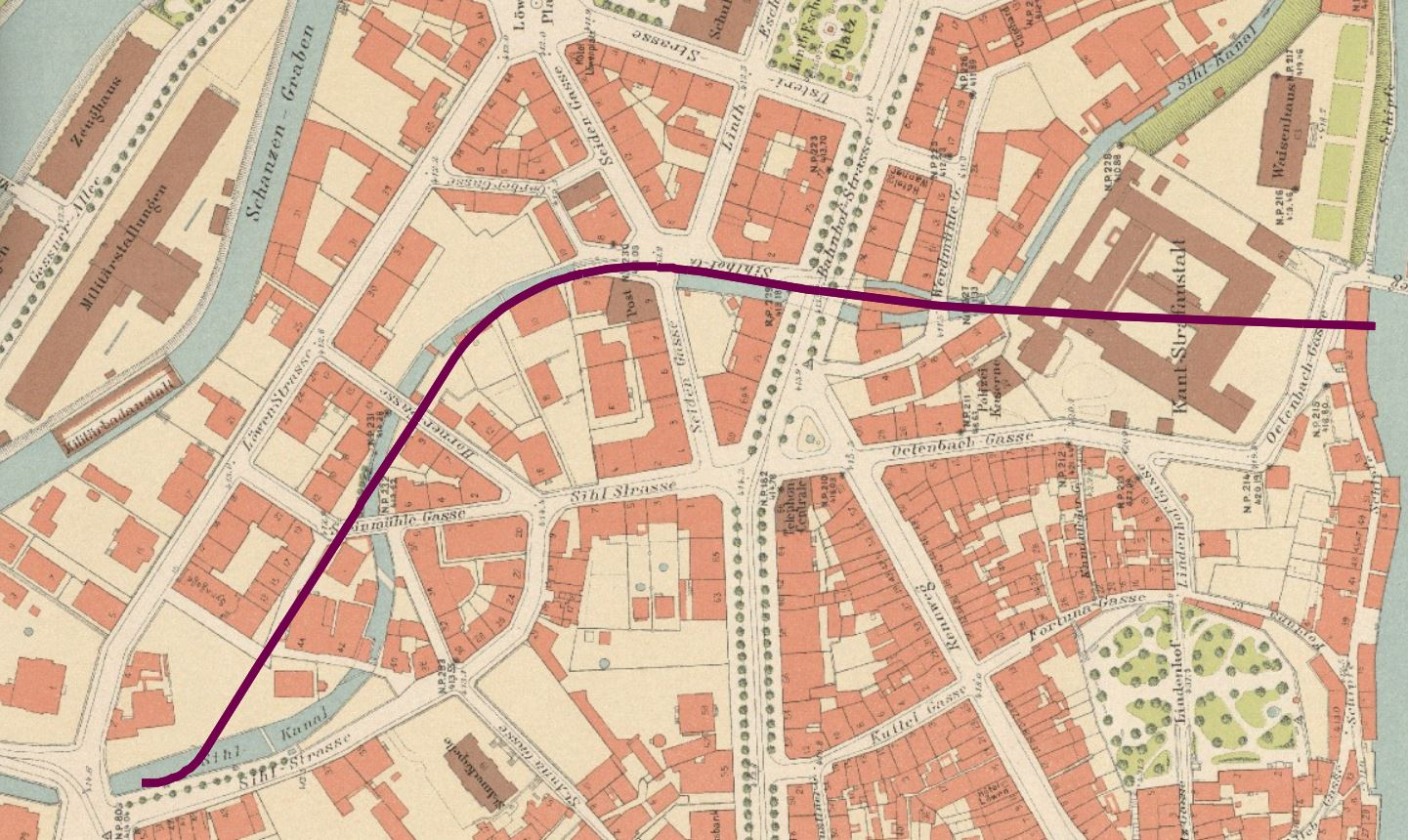 ehemaliger Sihlkanal, Zürich, Schweiz, 1900: darüber heutige Uraniastrasse eingezeichnet